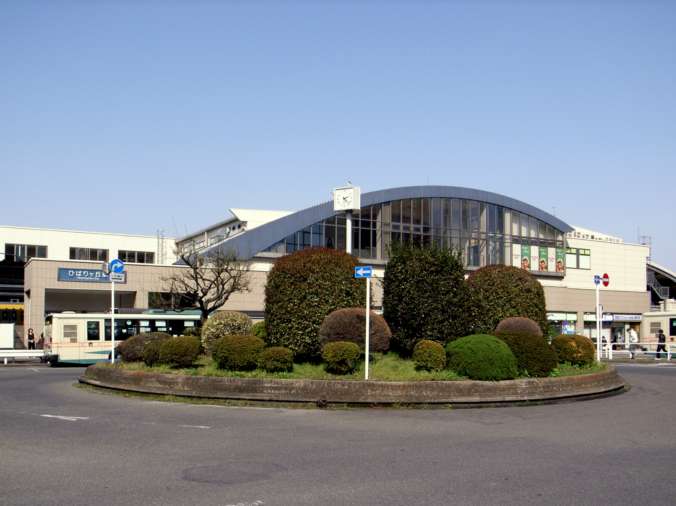 西武池袋線ひばりヶ丘駅南口